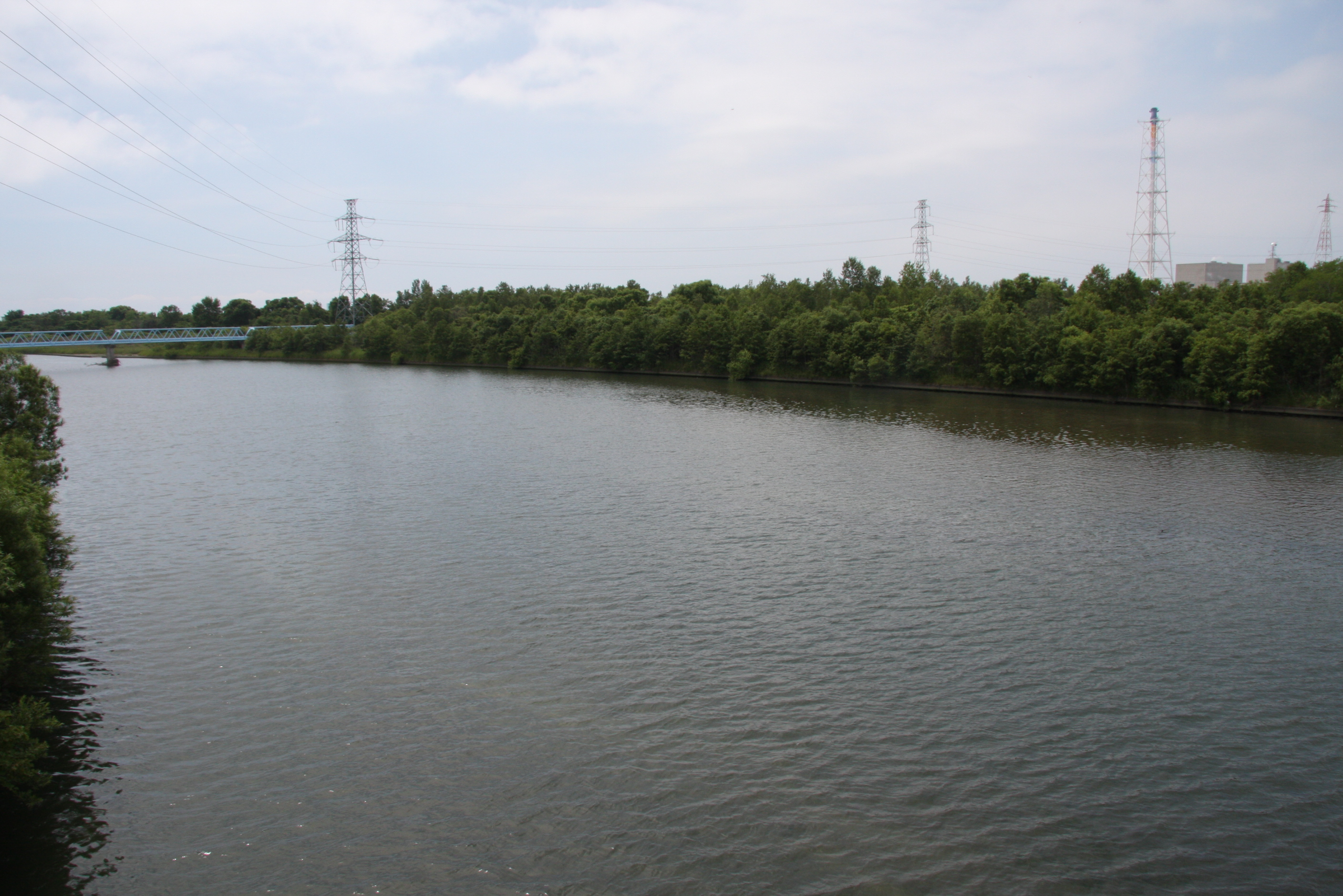 新長流橋より望む長流川と伊達火力発電所